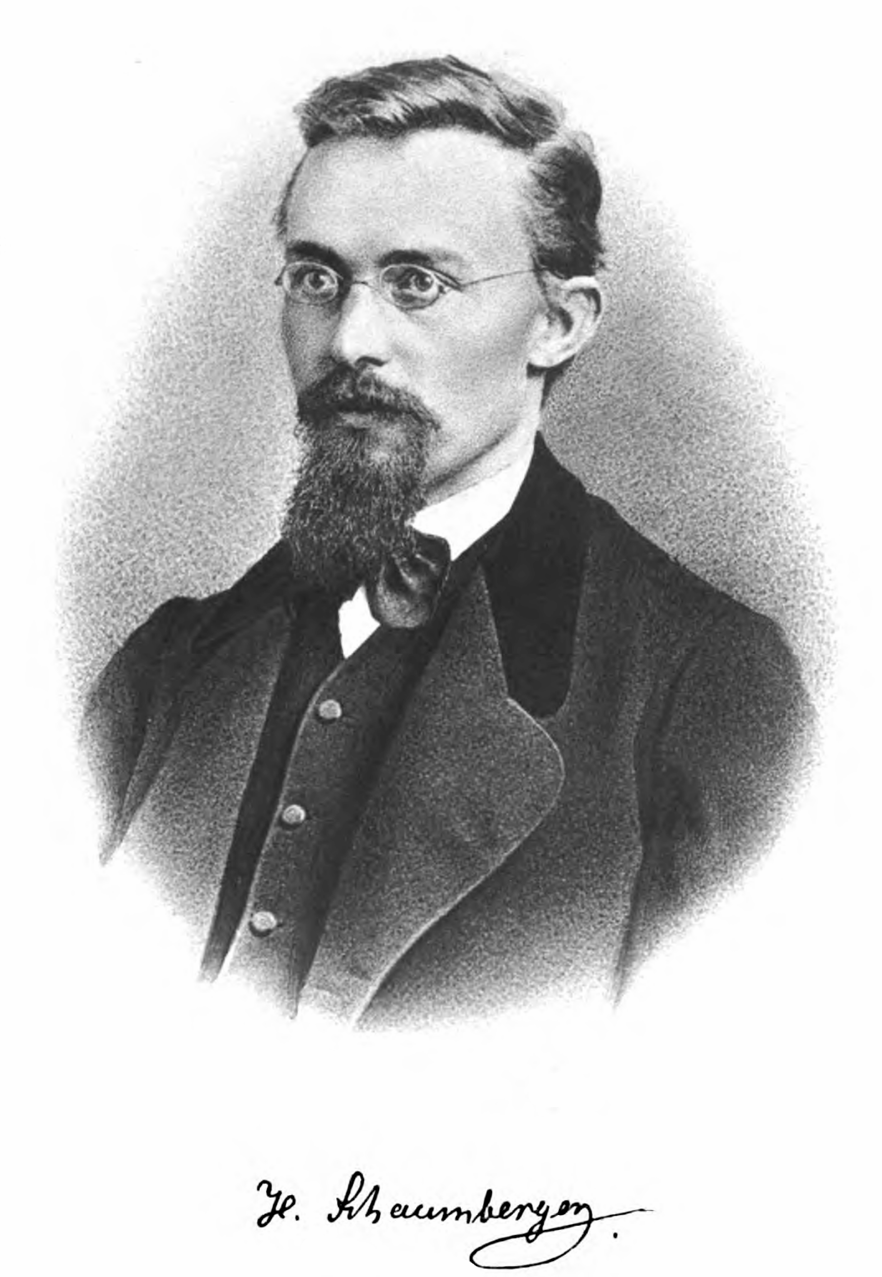 Portrait: Heinrich Schaumberger. In: Hugo Möbius: Heinrich Schaumberger. Sein Leben und seine Werke. Nach authentischen Quellen dargestellt. Julius Zwißler, Wolfenbüttel [1882]